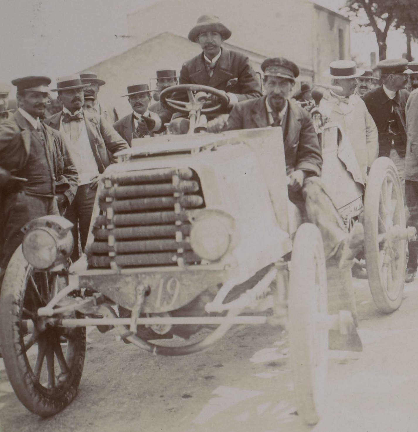 [Collection Jules Beau. Photographie sportive] : T. 10. Année 1899 / Jules Beau : F. 6. [Course automobile du Tour de France, 1899]